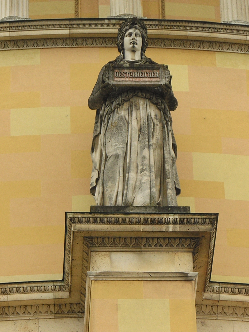 Diese Statue an der Aussenseite der Befreiungshalle in Kelheim steht für den Volksstamm der Oesterreicher (Schreibweise beachten), Höhe der Statue 580 cm. Sie ist eine von 18 Statuen, die nach Modellen des Bildhauers Johann Halbig geschaffen wurden.